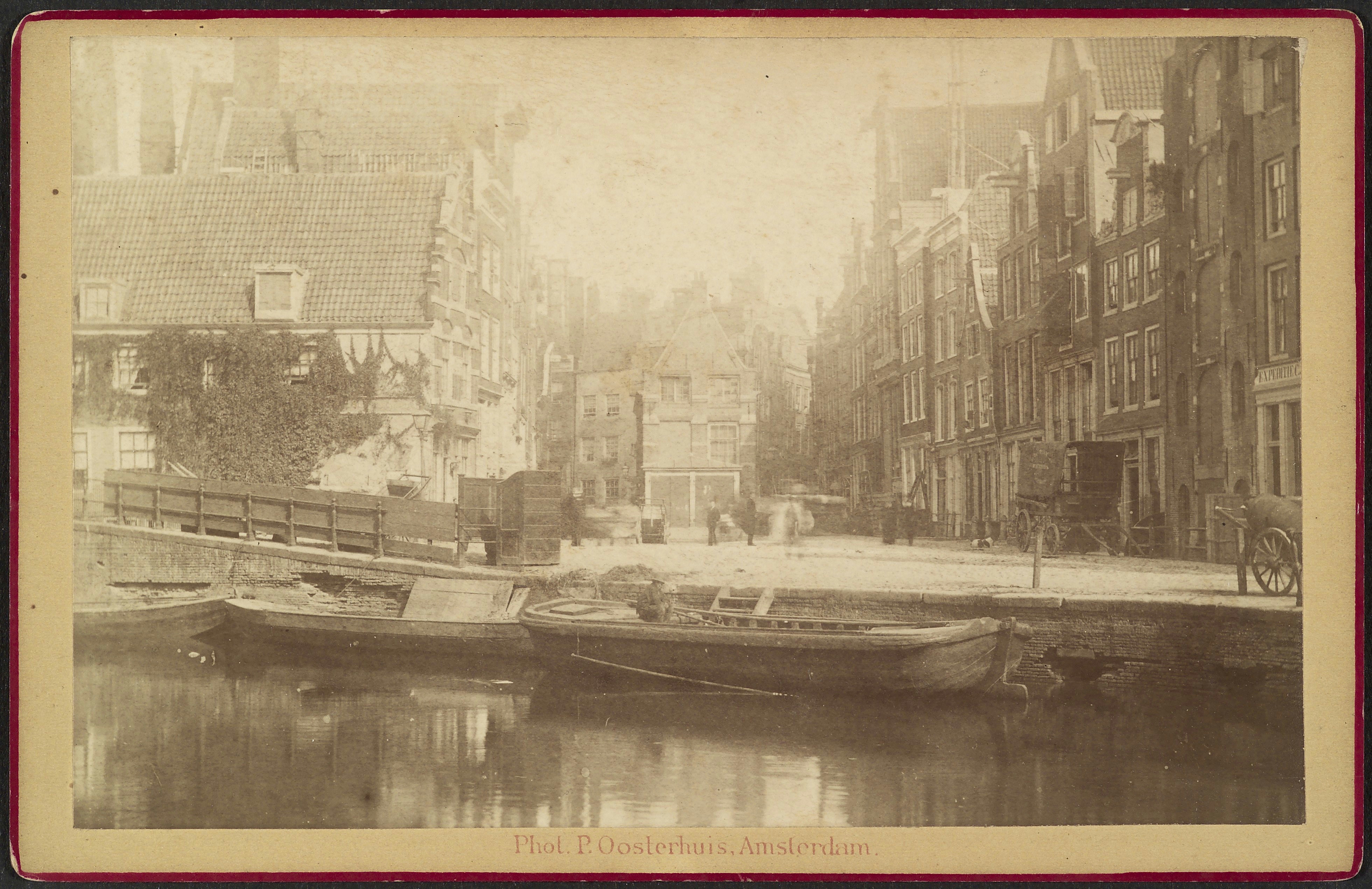 gevelsteen De eenhoorn in Korenmetershuisje: Gracht met zicht op korenmetershuisje (opmerking: Kabinetfoto)